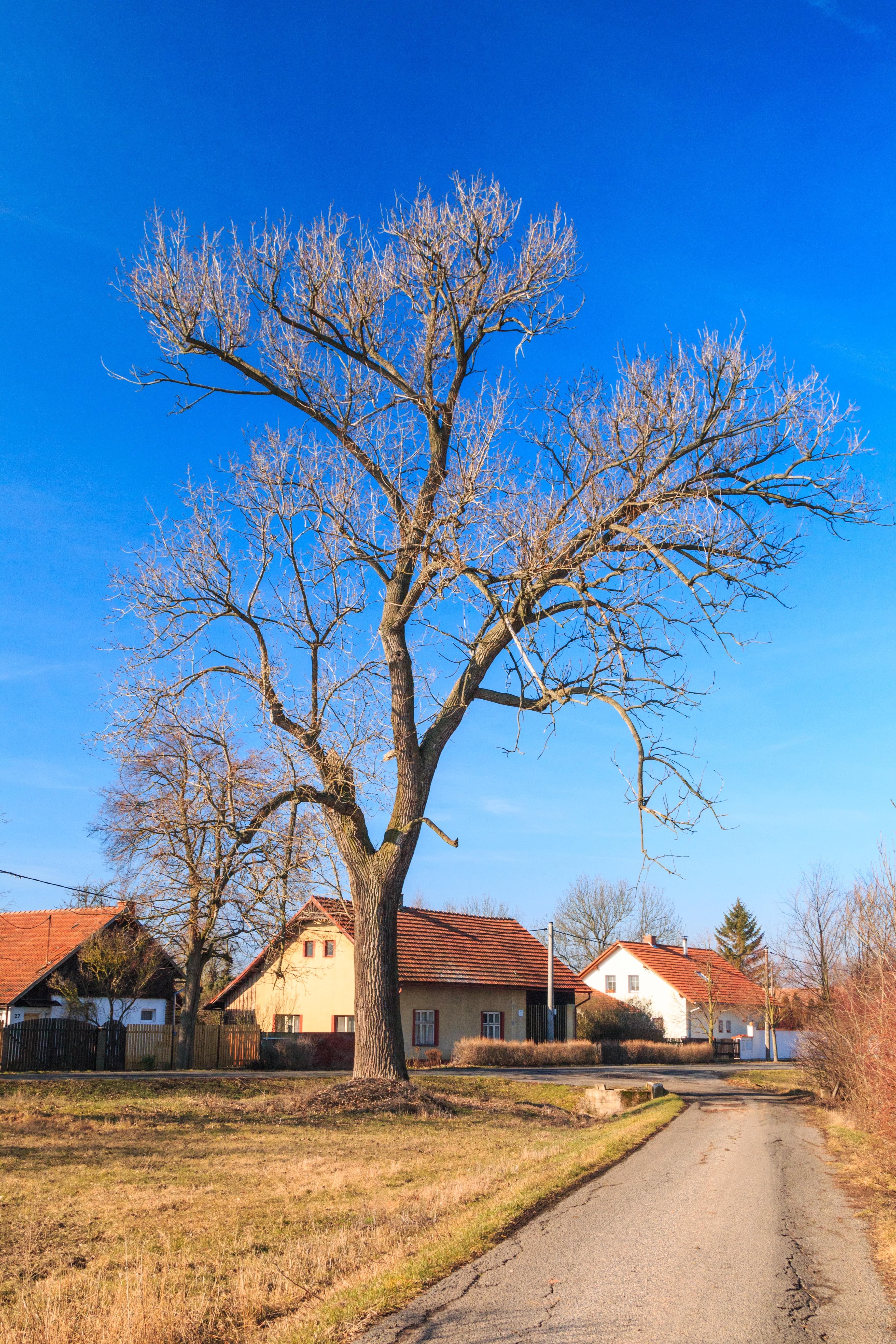 Památný topol u rybníka Slatinka u Malé Strany Project: Vodstvo. Ticket: 1711.